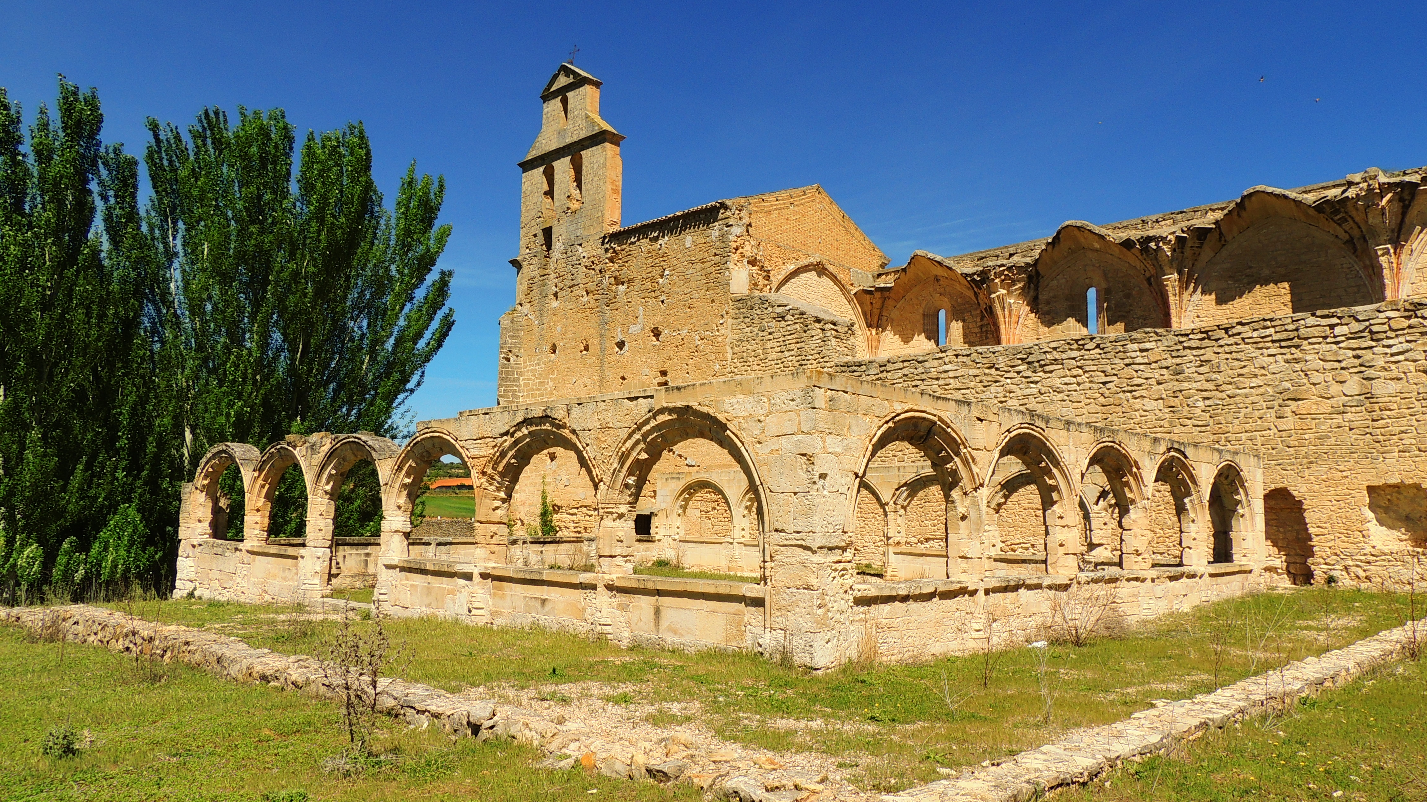 Convento